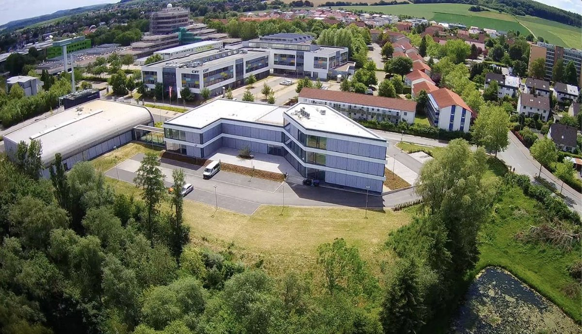 Innovation Campus Lemgo aus nordwestlicher Richtung. Zeigt das Cluster Industrielle Automation mit Fraunhofer-Institut, SmartfactoryOwL und Centrum Industrial IT.